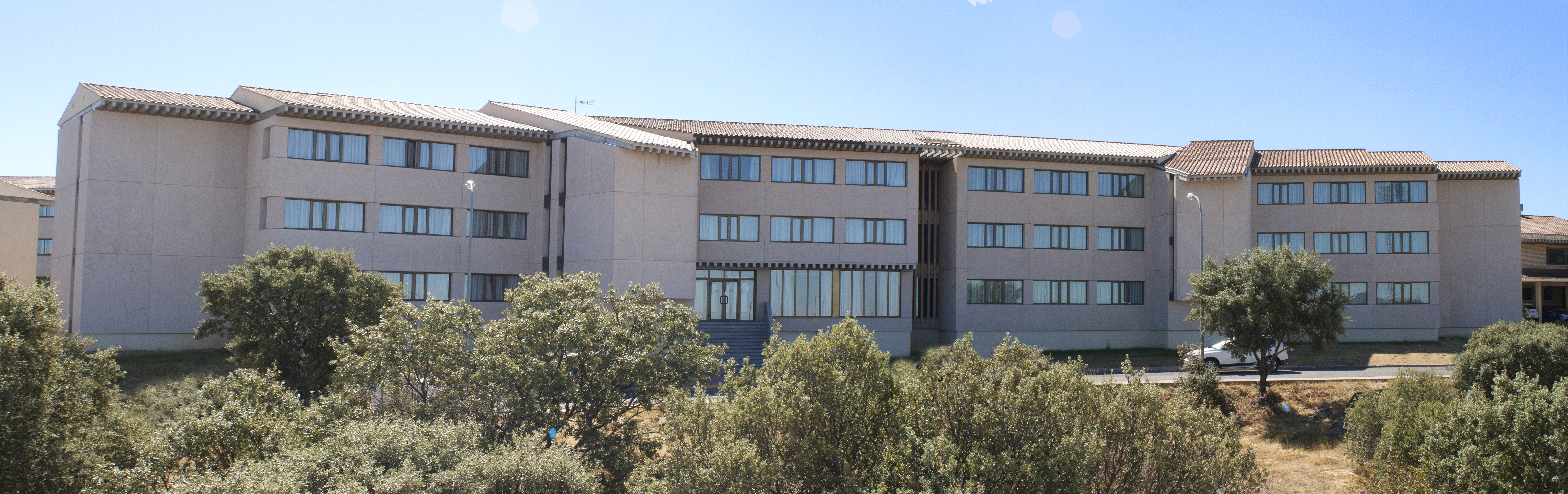 Bloques vivienda alumnos